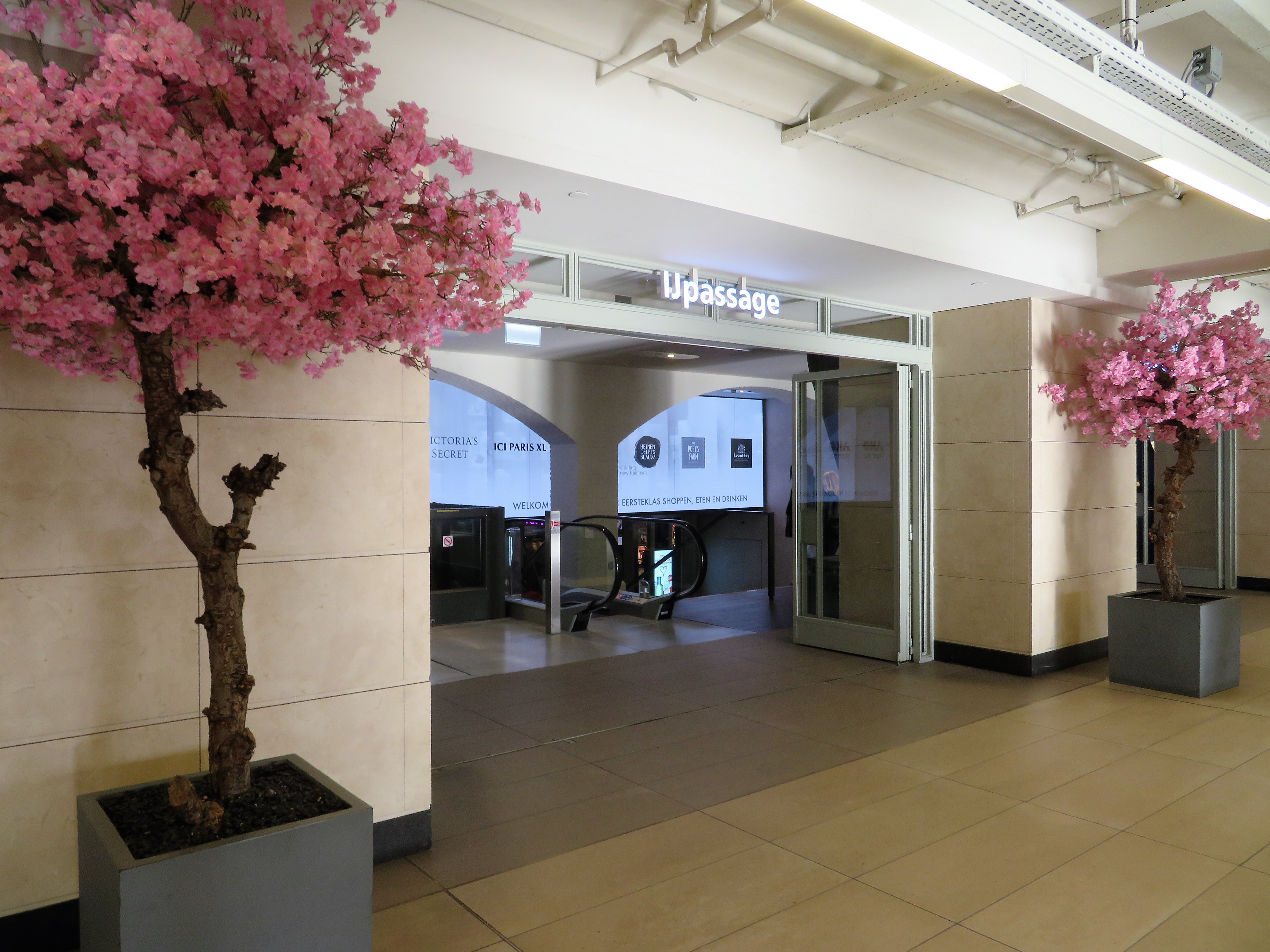 IJpassage in het Centraal Station Amsterdam